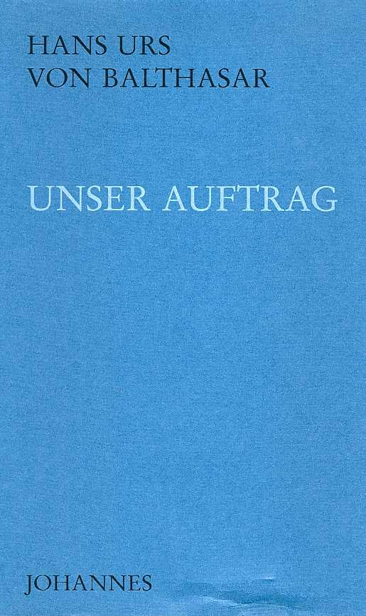 Copertina dell'edizione in lingua originale de Il nostro compito (Unser Auftrag) di Hans Urs von Balthasar. ISBN 978-3-89411-080-2.